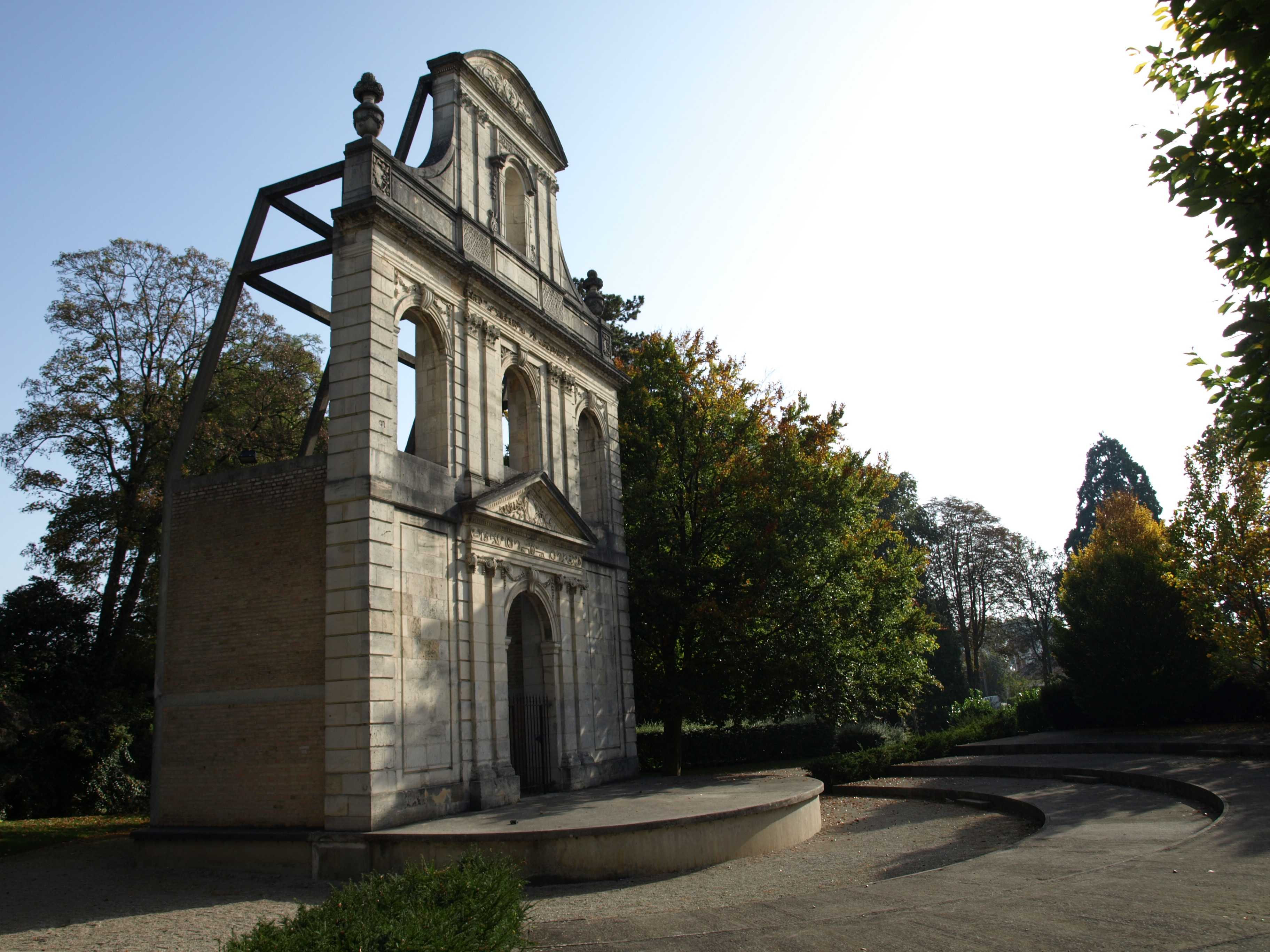 Vitry-le-François (51300 - FRANCE) : photographies Vitry-le-François (51300 - FRANCE) :Parc de l'Hôtel de ville et ancienne porte